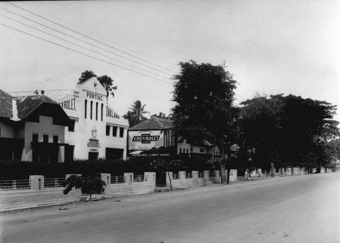 Foto. Woonhuizen en autohandel te Kediri, Oost-Java.